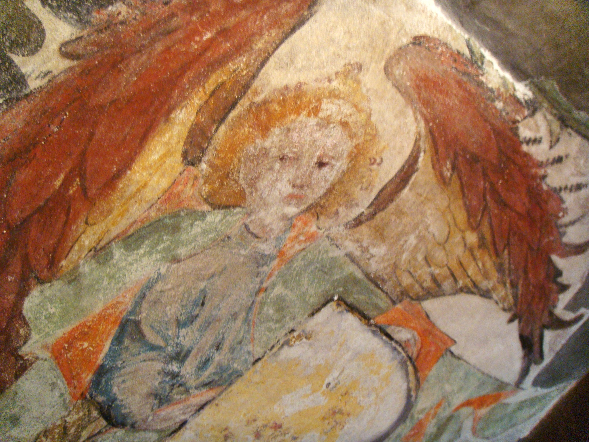 Engel, Temperamalerei in der Stiftskirche Neustadt, Prot. Teil, freigelegt 2012